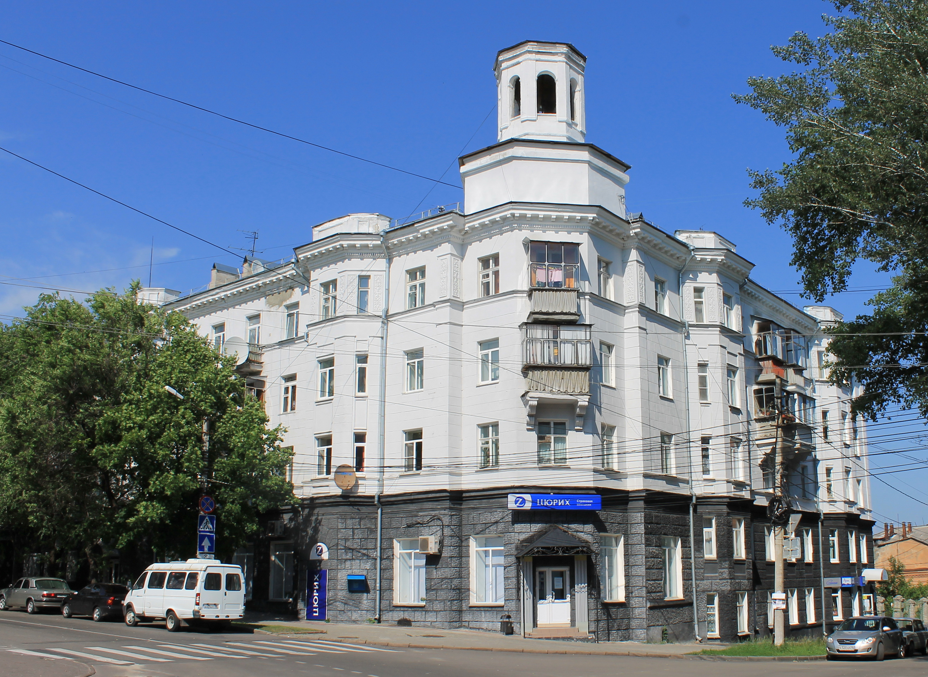 Угловой жилой дом с башенкой на ул. Горького, 9 в городе Курске